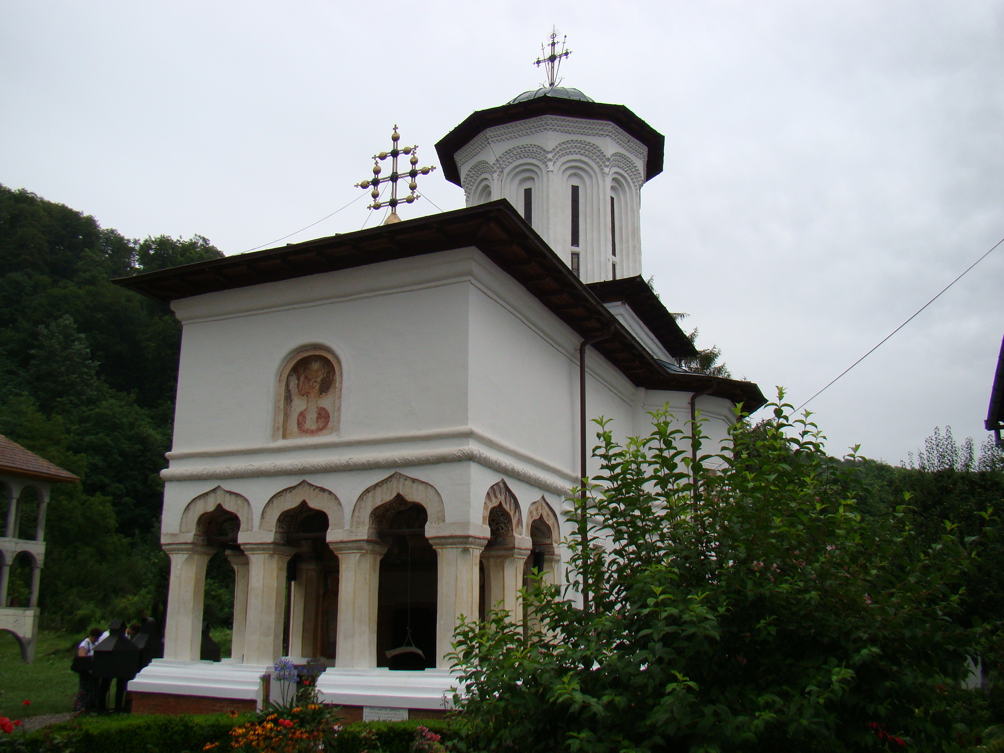 Biserica Manastirii Surpatele